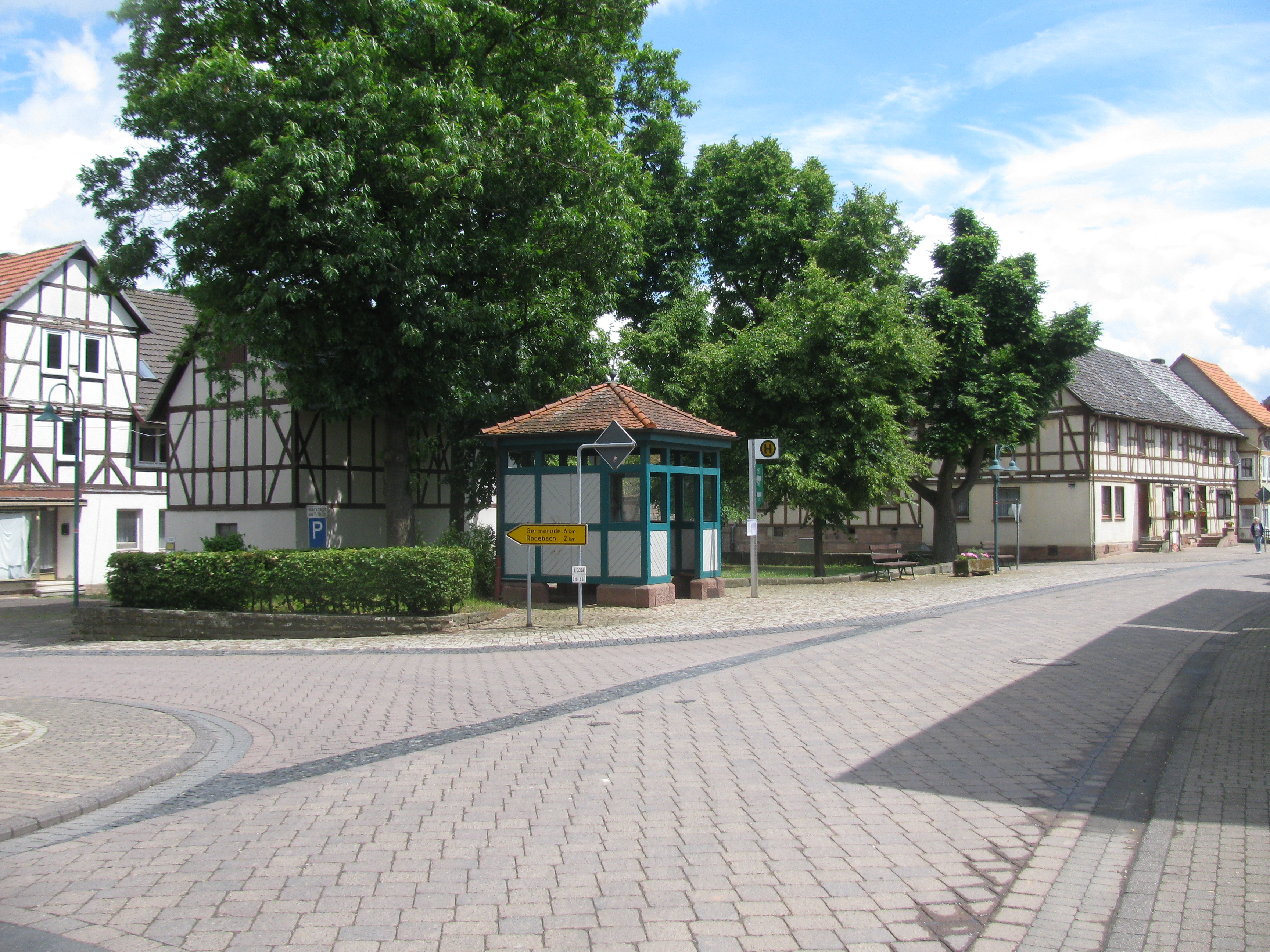 die Bushaltestelle Am Anger in der Bilsteinstraße in Waldkappel-Harmuthsachsen für die Fahrtrichtung Hessisch Lichtenau